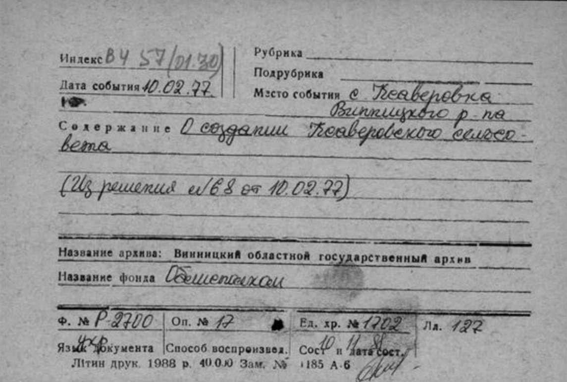 Село Ксаверівка Вінницького району. 10.02.1977. Створення Ксаверівської сільської ради